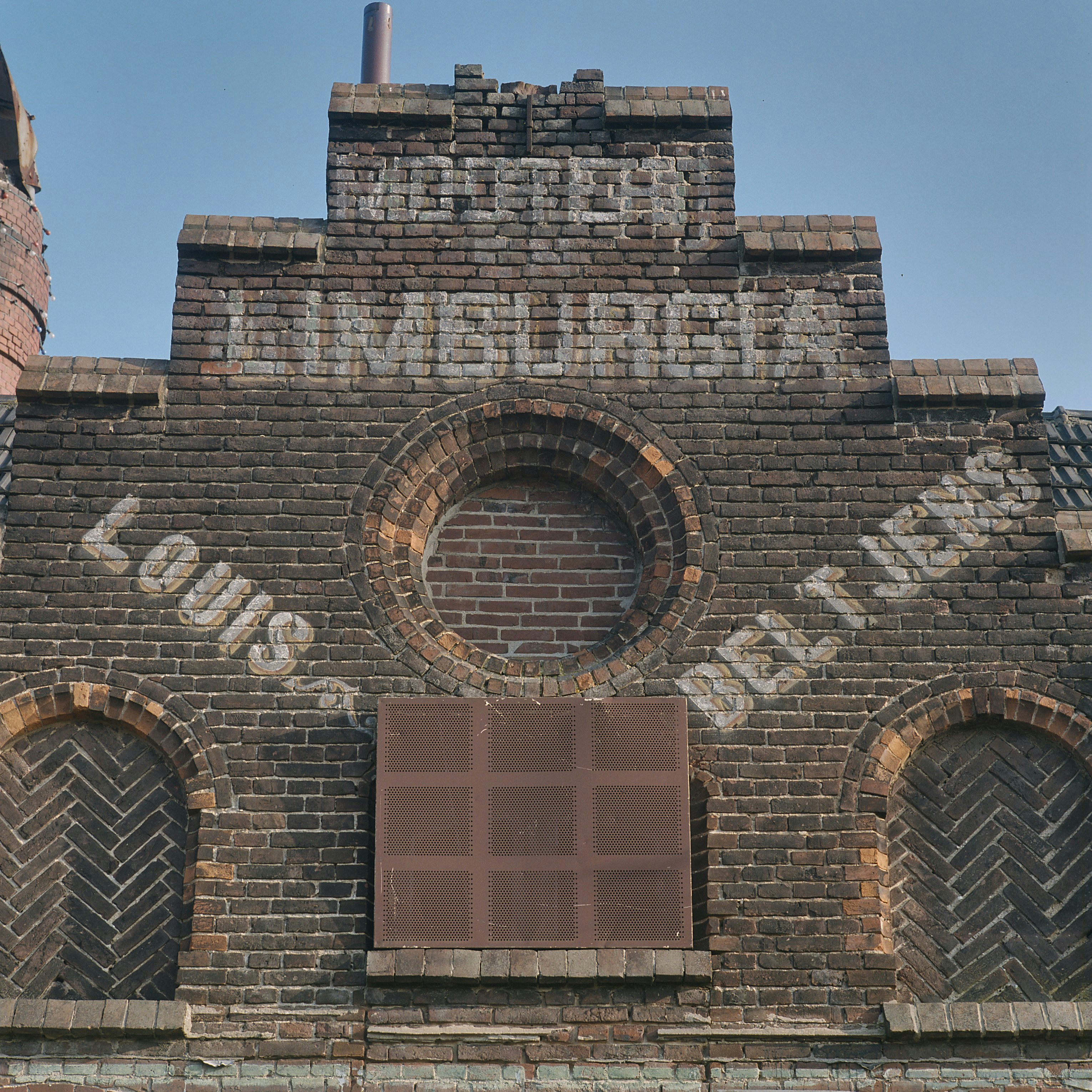 Voormalige Mouterij Limburgia: Detail westgevel: belettering Louis Beltjens